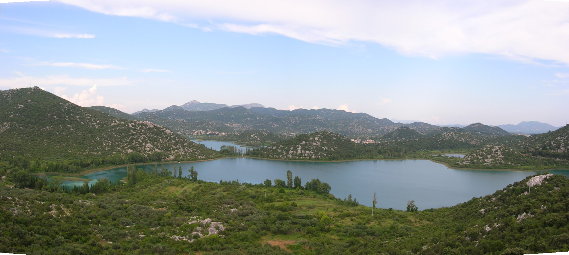 Neretva near its delta, in Croatia